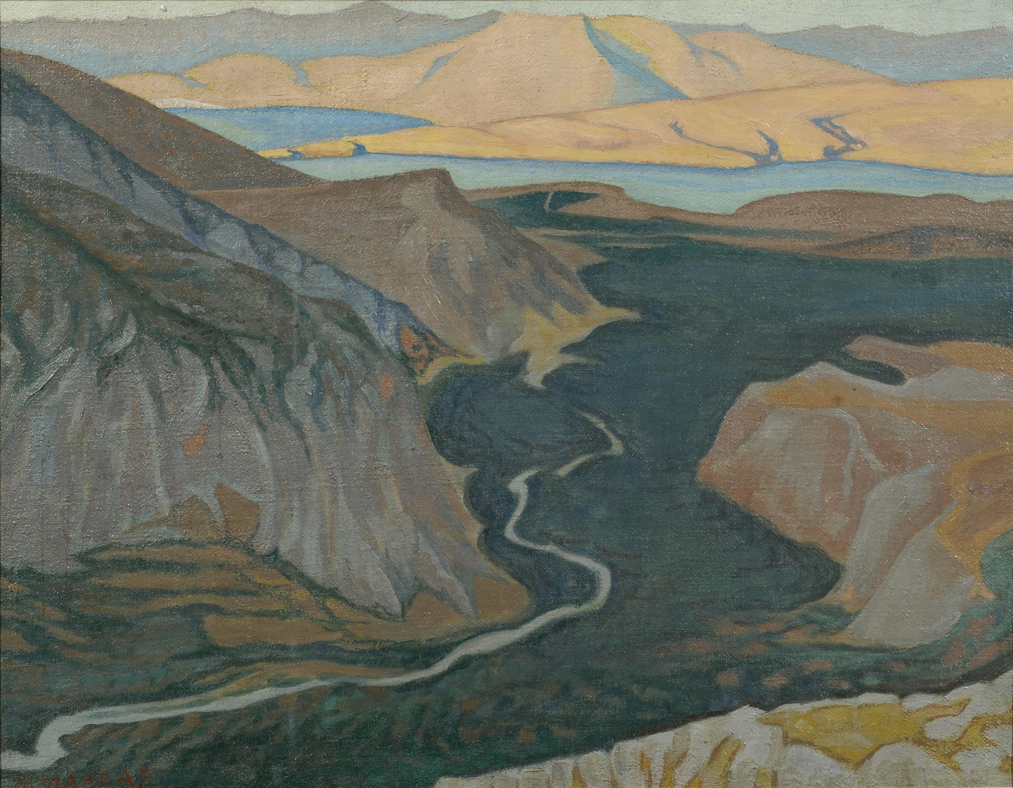 Delphi/Delphes